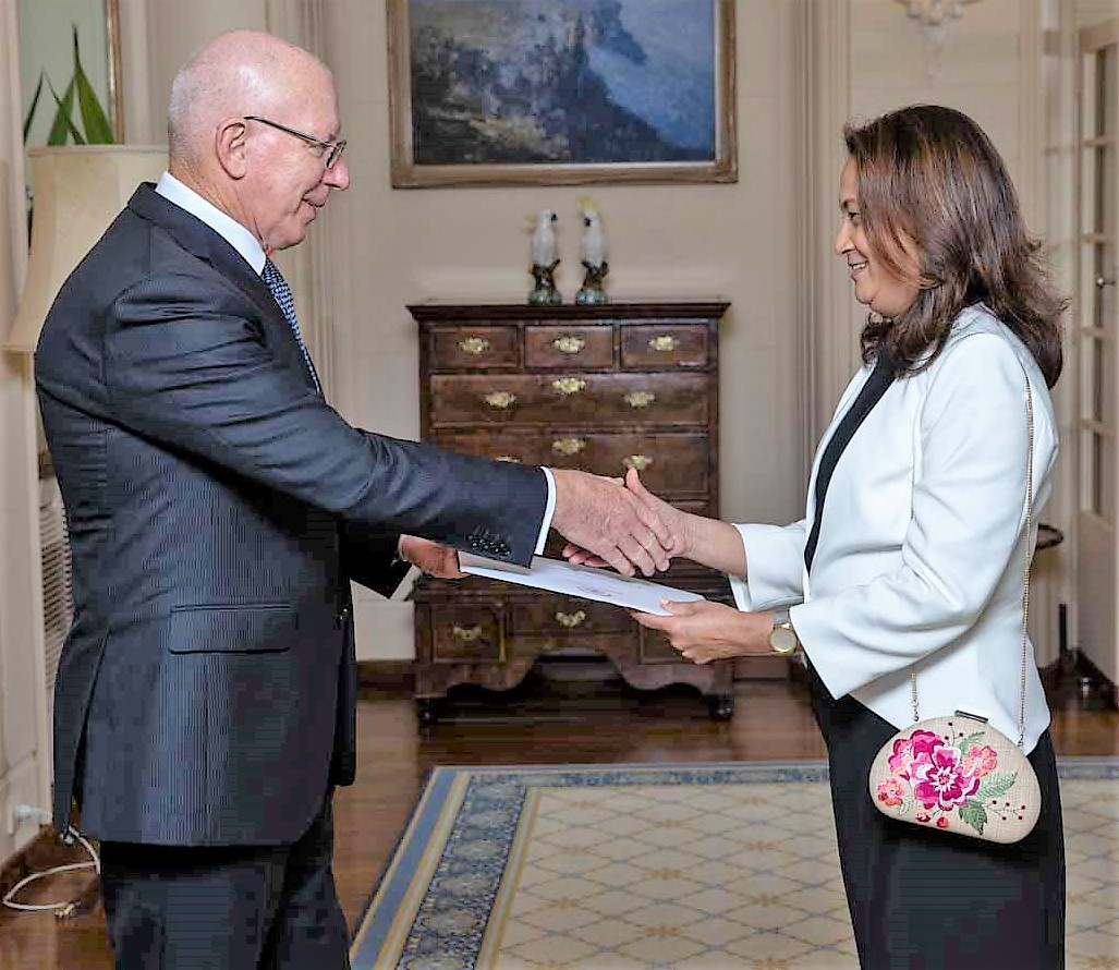 Inês Maria de Almeida übergibt hre Akkreditierung an Generalgouverneur David Hurley.